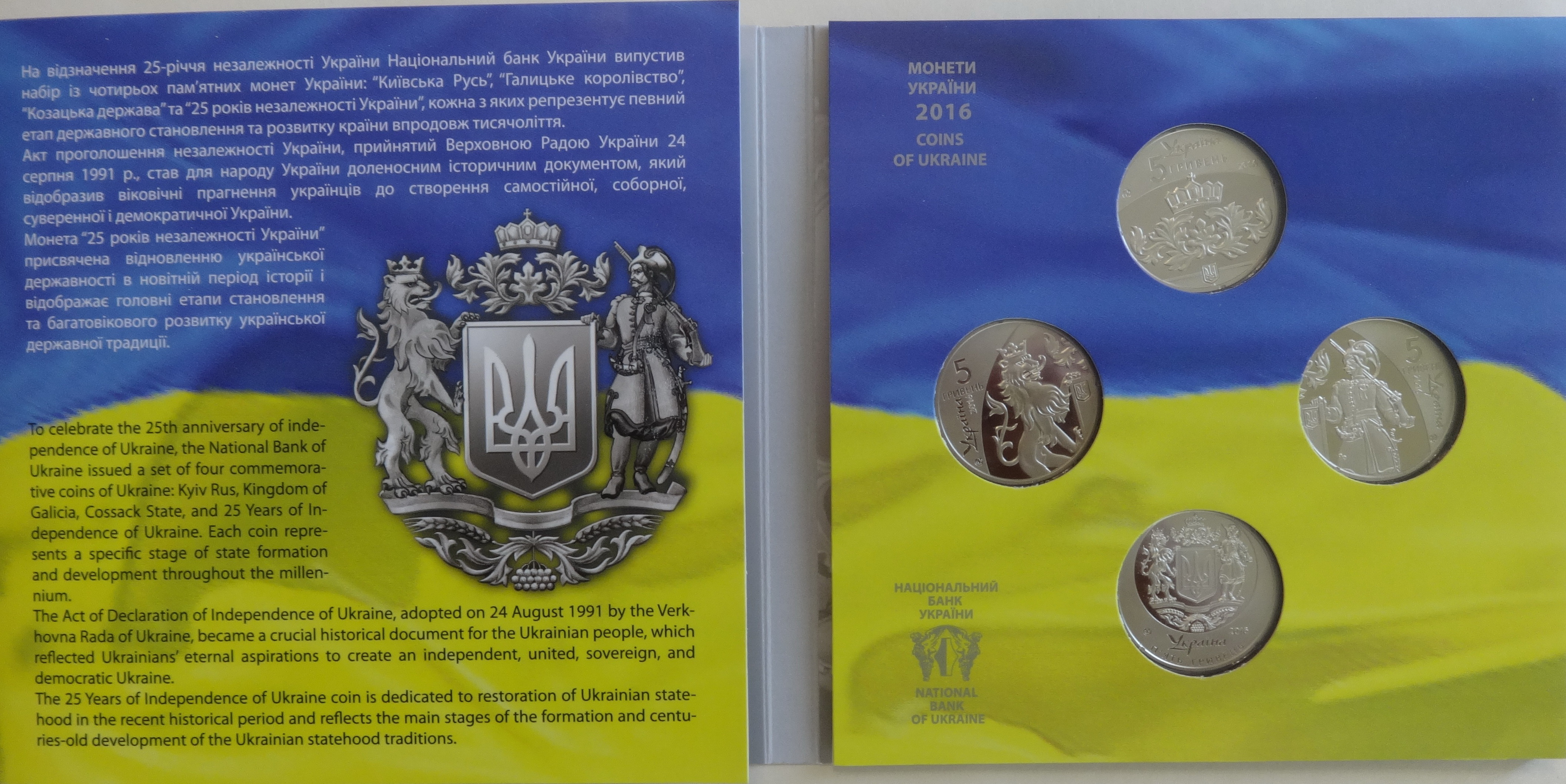 Набір монет НБУ «25 років незалежності України». Перший розворот.